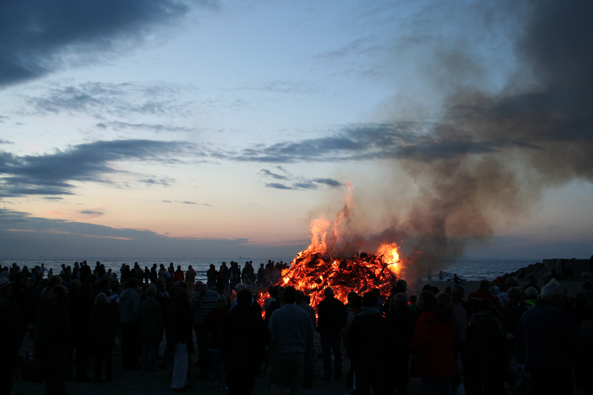 Sankt Hans Hornbæk strand 2012 4